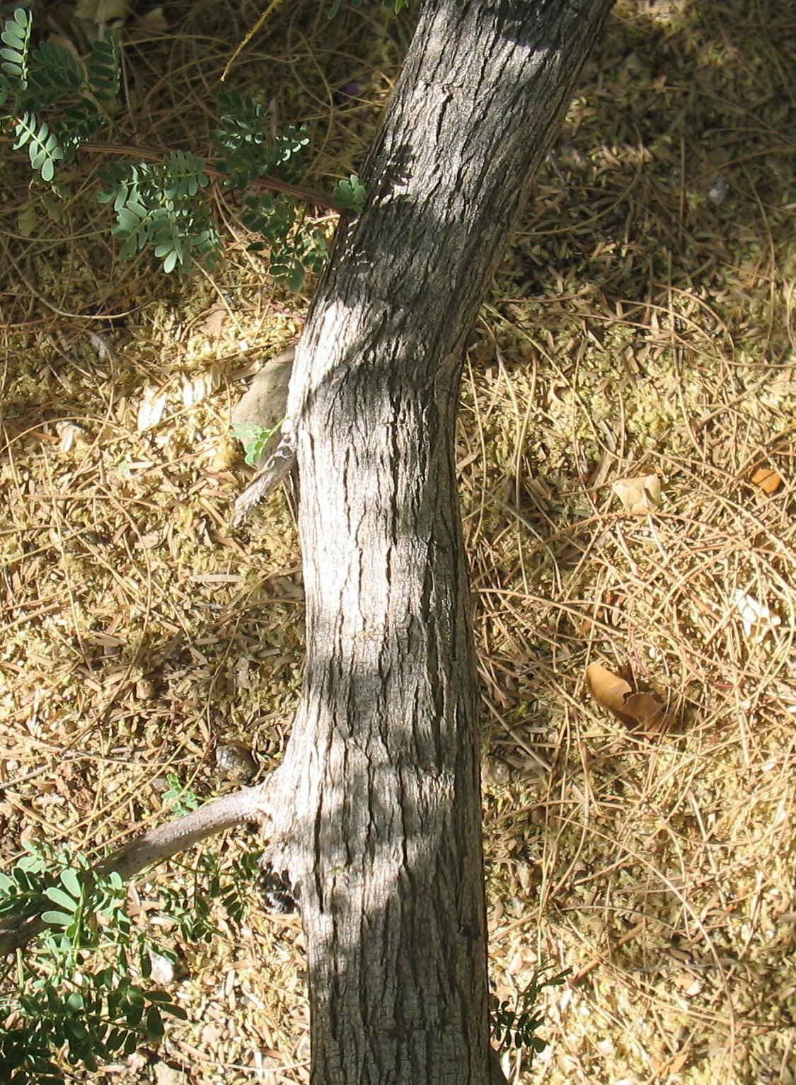 Acacia greggii bark